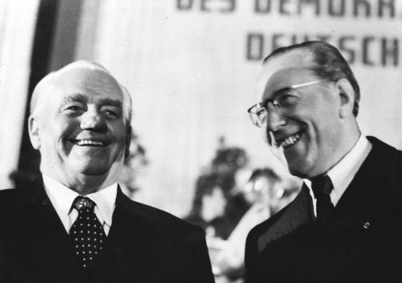 Zentralbild/Zühlsdorf Gründung der Deutschen Demokratischen Republik am 7.10.1949 Im Gebäude der DWK (Deutsche Wirtschafts Kommission) in Berlin Leipziger Straße wählten am 11. Oktober 1949 die Provisorische Länderkammer und die Provisorische Volkskammer einstimmig Wilhelm Pieck zum Staatspräsidenten der Deutschen Demokratischen Republik. UBz: Staatspräsident Wilhelm Pieck (l.) und Ministerpräsident Otto Grotewohl.